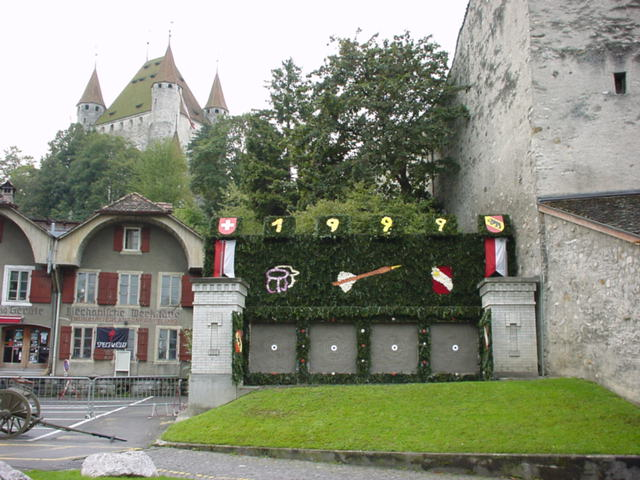 Schiessstand “Täntsch” Thun - 1999